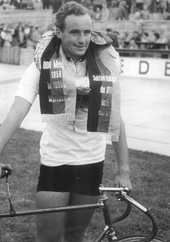 Jürgen Simon Zentralbild Wendorf 29.7.1956 Bey-Ka. DDR-Meisterschaften im Radsport Am Sonnabend, dem 28.7.1956, wurden auf der Radrennbahn in Berlin Weissensee die DDR-Meisterschaften im Bahnfahren fortgesetzt. Den Titel im Dauerfahren holte sich der Favorit Bruno Zieger (Post Berlin) vor Stammer und Keil. Im 1000-m-Malfahren sicherte sich der Titelverteidiger Jürgen Simon (Einheit Berlin) vor Stäber (Dynamo Berlin) erneut die Meisterschaft. UBz: Erfolgreich konnte Jürgen Simon (SC Einheit Berlin) seinen Titel im 1000 m Malfahren der Junioren verteidigen. DDR-Meister 1956 Jürgen Simon.